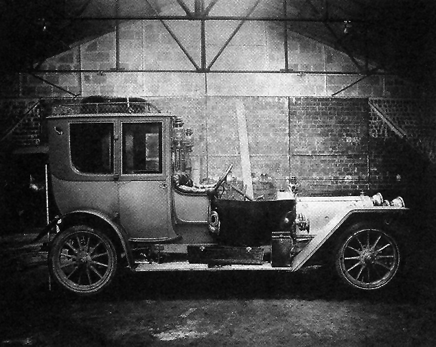 A Delaunay Belleville de Mr. Normand du braquage de la Rue Ordenner, retrouvée a Dieppe. volé par Banda a Bonnot at 1911.